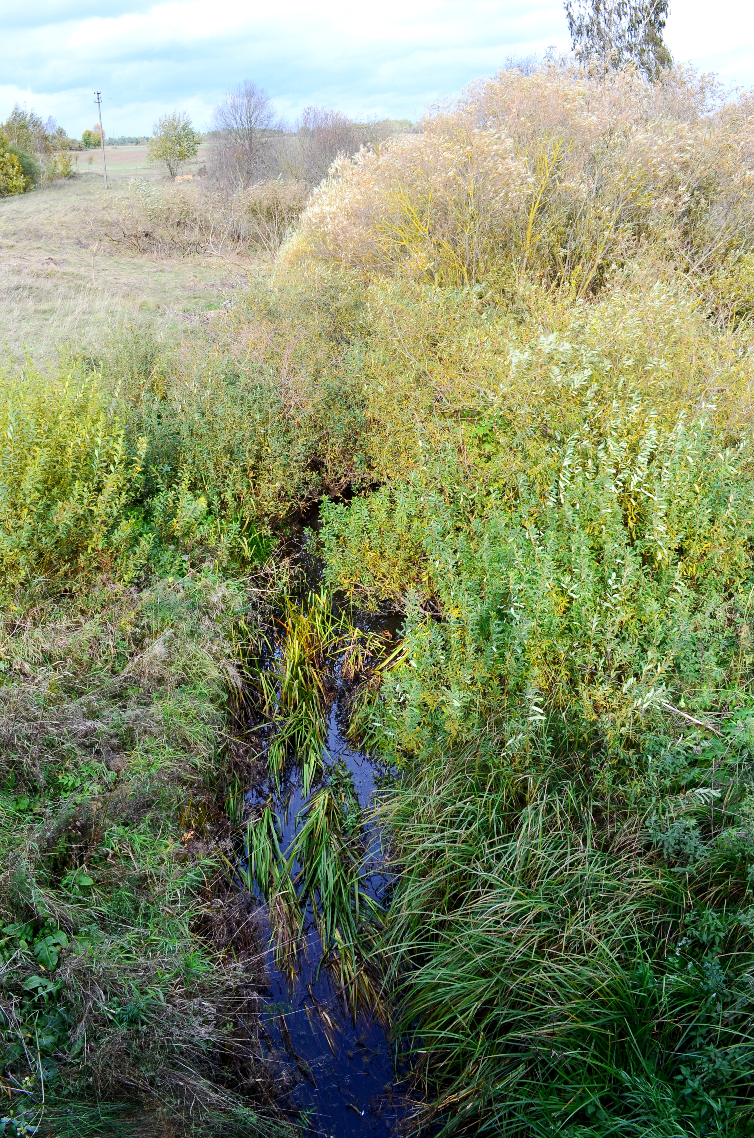 Druja (Virvytės intakas) šalia Lingėnų, Telšių raj.